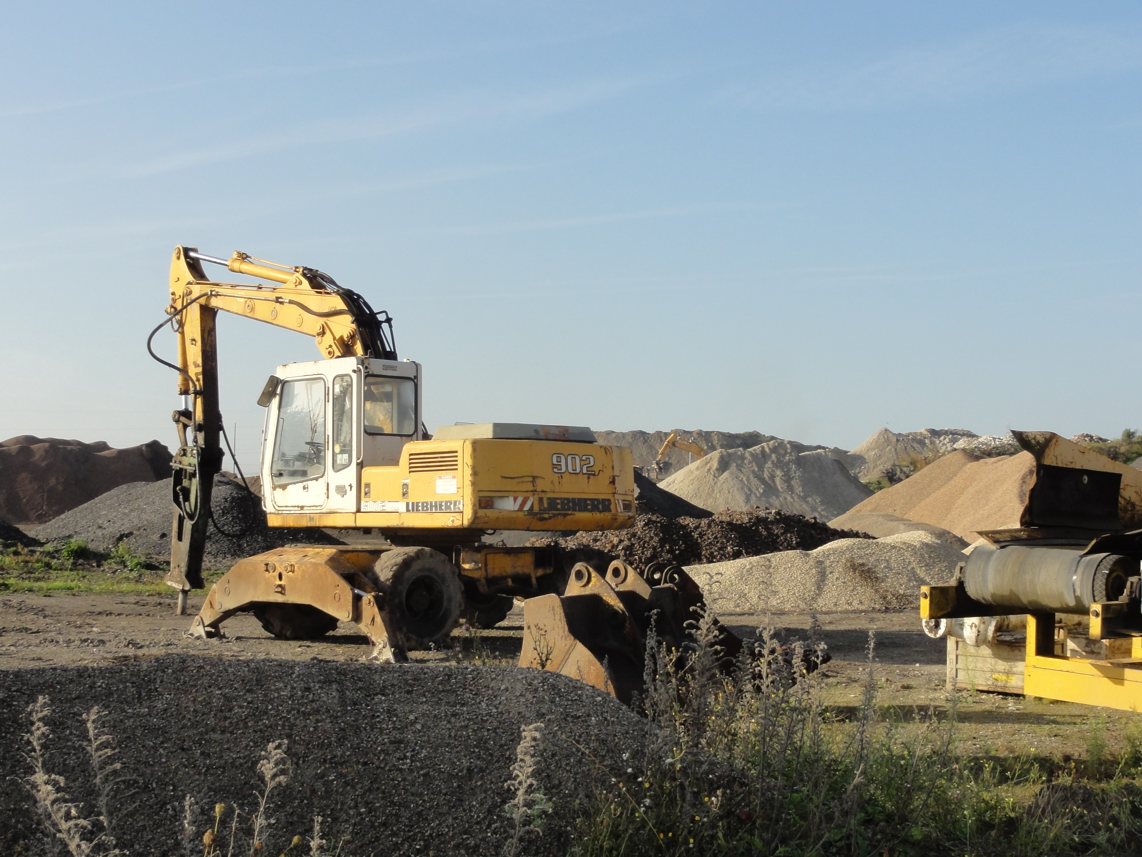 Terril n° 77 dit 8 de Béthune, fosse n° 8 - 8 bis de la Compagnie des mines de Béthune dans le bassin minier du Nord-Pas-de-Calais, Auchy-les-Mines, Pas-de-Calais, Nord-Pas-de-Calais, France.